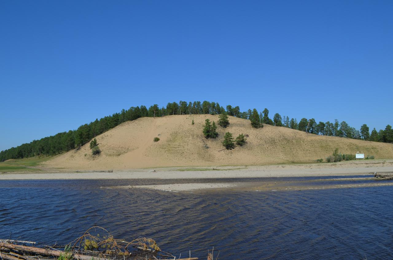 Речка Суола и гора Суулар Мыраан неподалёку от села Тектюр